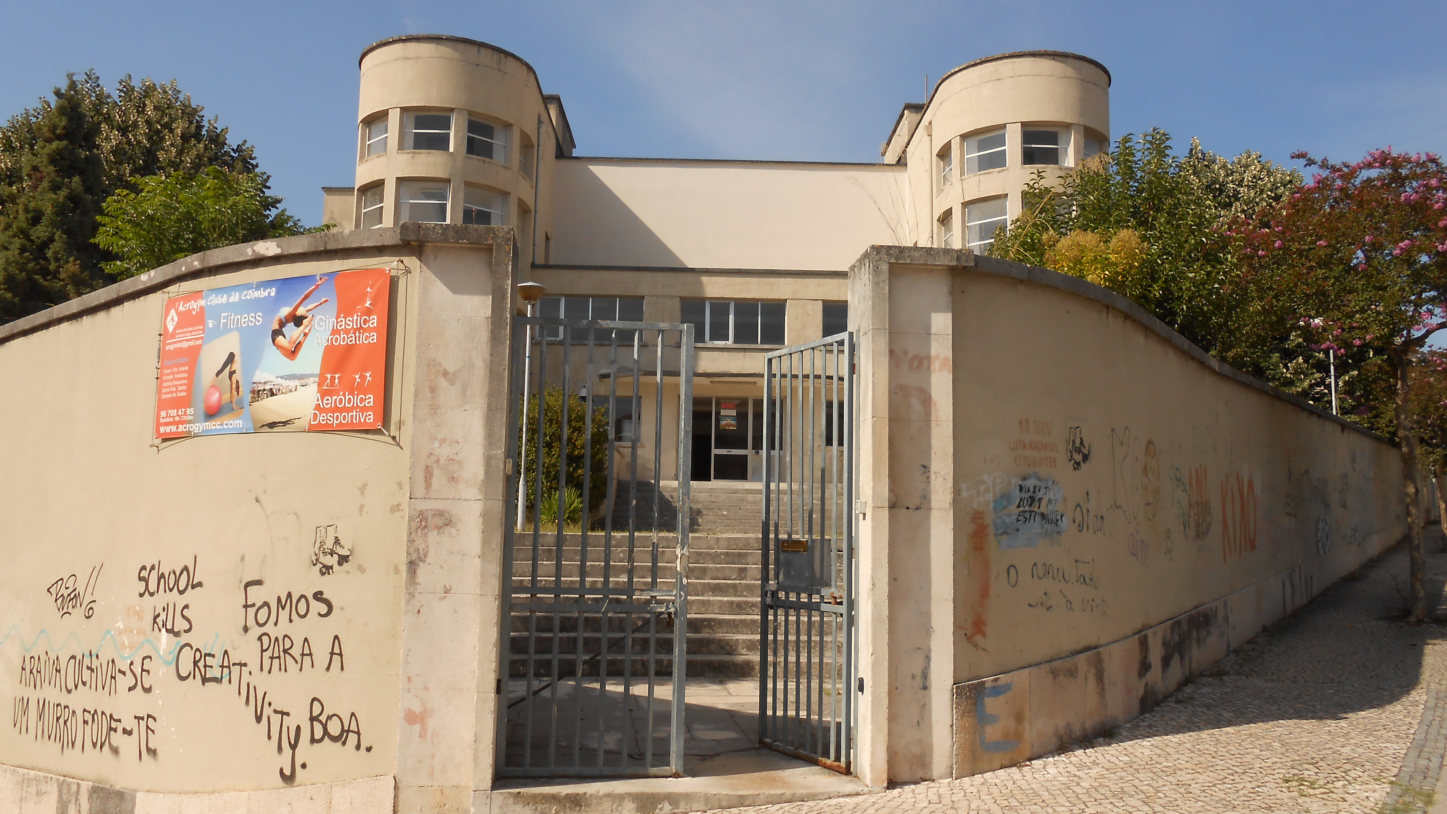 Escola Secundária José Falcão.